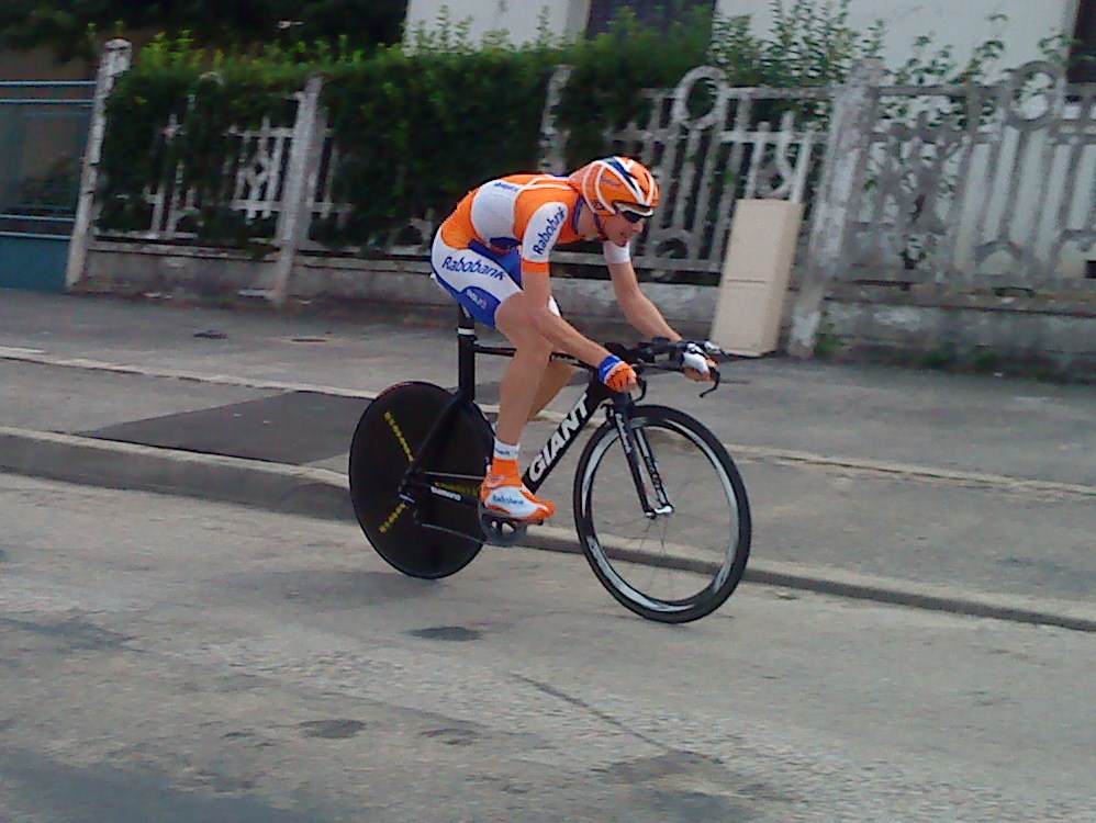 Mats Boeve lors du prologue du Tour de l'Ain 2010